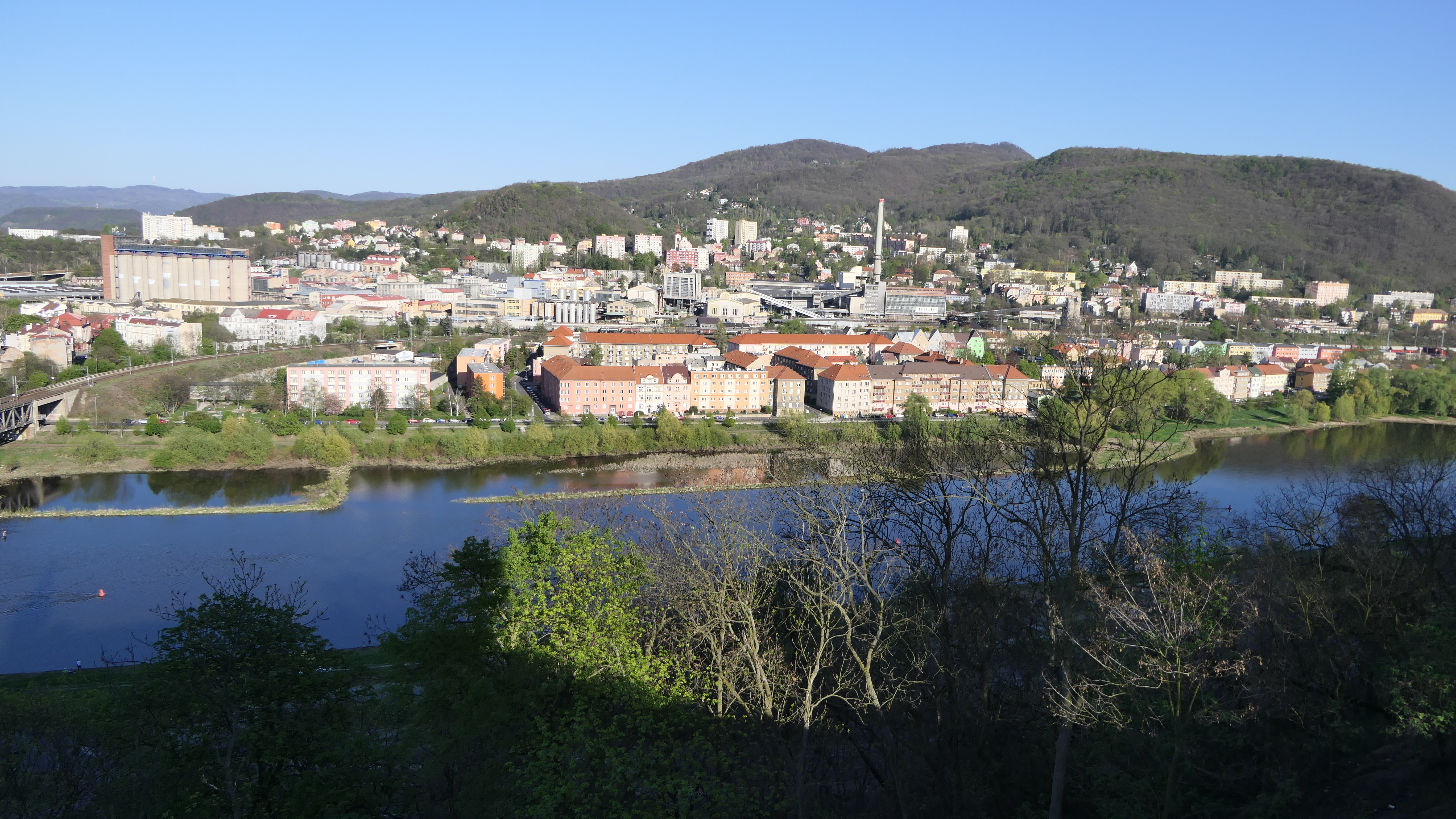 Blick auf den Stadtteil Strekov von Usti nad Labem